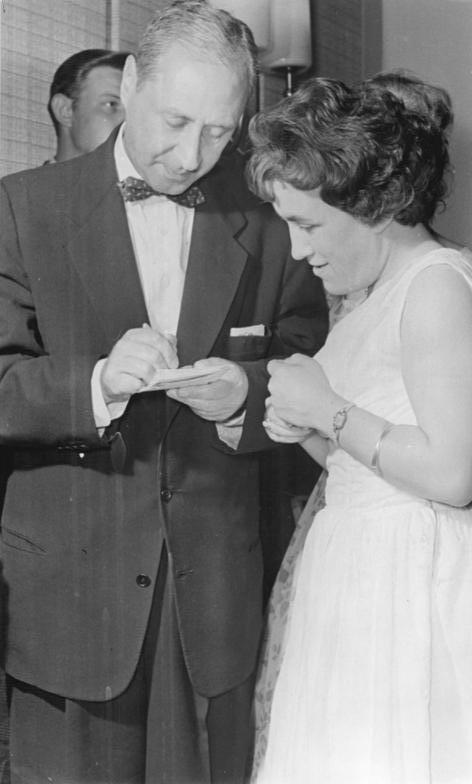 Zentralbild Gahlbeck 13.6.1960 2. Arbeiterfestspiele des FDGB. Filmforum und Filmball zu den Arbeiterfestspielen in Aue. Das Filmforum und der Filmball hatte am 11.6.1960 viele Hundert in das Wismut-Kulturhaus in Aue gelockt. Zahlreiche prominente DEFA-Künstler waren erschienen, unter ihnen Professor Wilkening, Leiter des DEFA-Spielfilmstudios, Raimund Schelcher, Erich Franz, Hans Lucke, Dieter Perlwitz, Willi Schrade und Erich Veldre sowie Harry Hindemith, Rolf Ludwig und Marianne Wünscher. Stürmisch begrüßt wurde der berühmte sowjetische Regisseur Sergei Jutkewitsch. UBz: Ständig umlagert von Autogrammjägern war auch der sowjetische Regisseur Sergei Jutkewitsch.